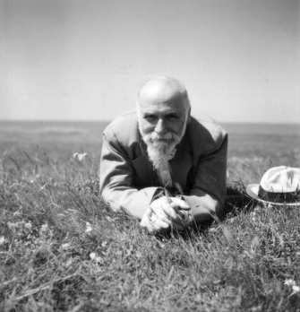 Deze foto van Philip Kohnstamm, mijn grootvader, is door mijn vader genomen in 1935. Beiden zijn overleden. Ik heb het beheer over de fotoalbums. De enige nog levende zoon van mijn grootvader, de 92-jarige Max Kohnstamm gaat ook akkoord met plaatsing in het publiek domein.--Dolph 2 nov 2006 21:52 (CET) Foto gemaakt door mijn inmiddels overleden vader, dr. G.A. Kohnstamm --Dolph 2 nov 2006 21:53 (CET)